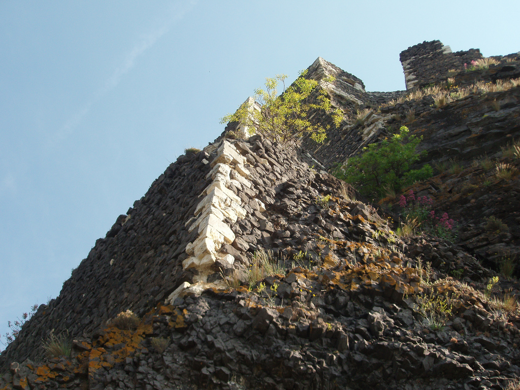 Murs du château de Rochemaure